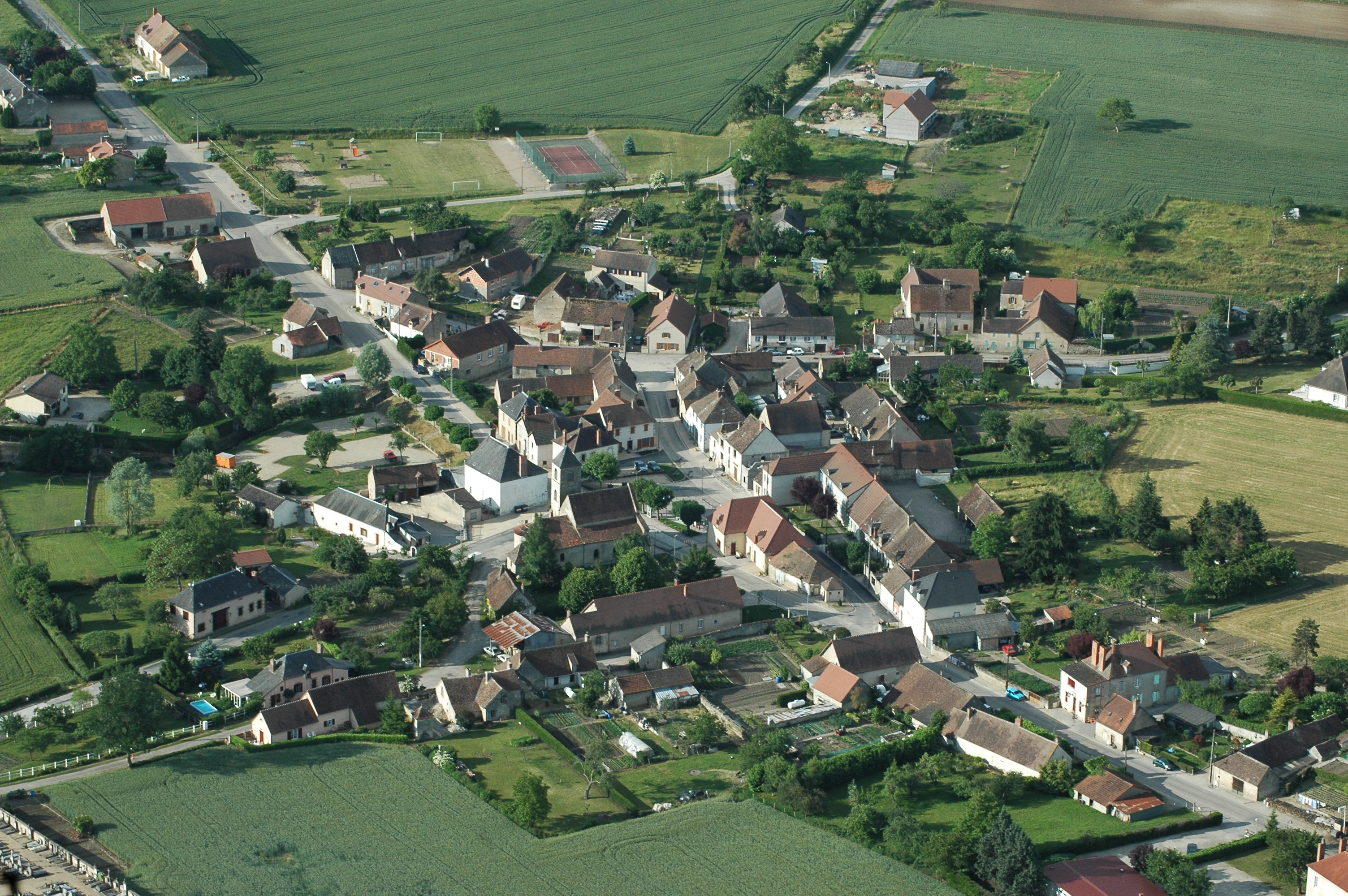 La commune de Bresnay, Allier, France.